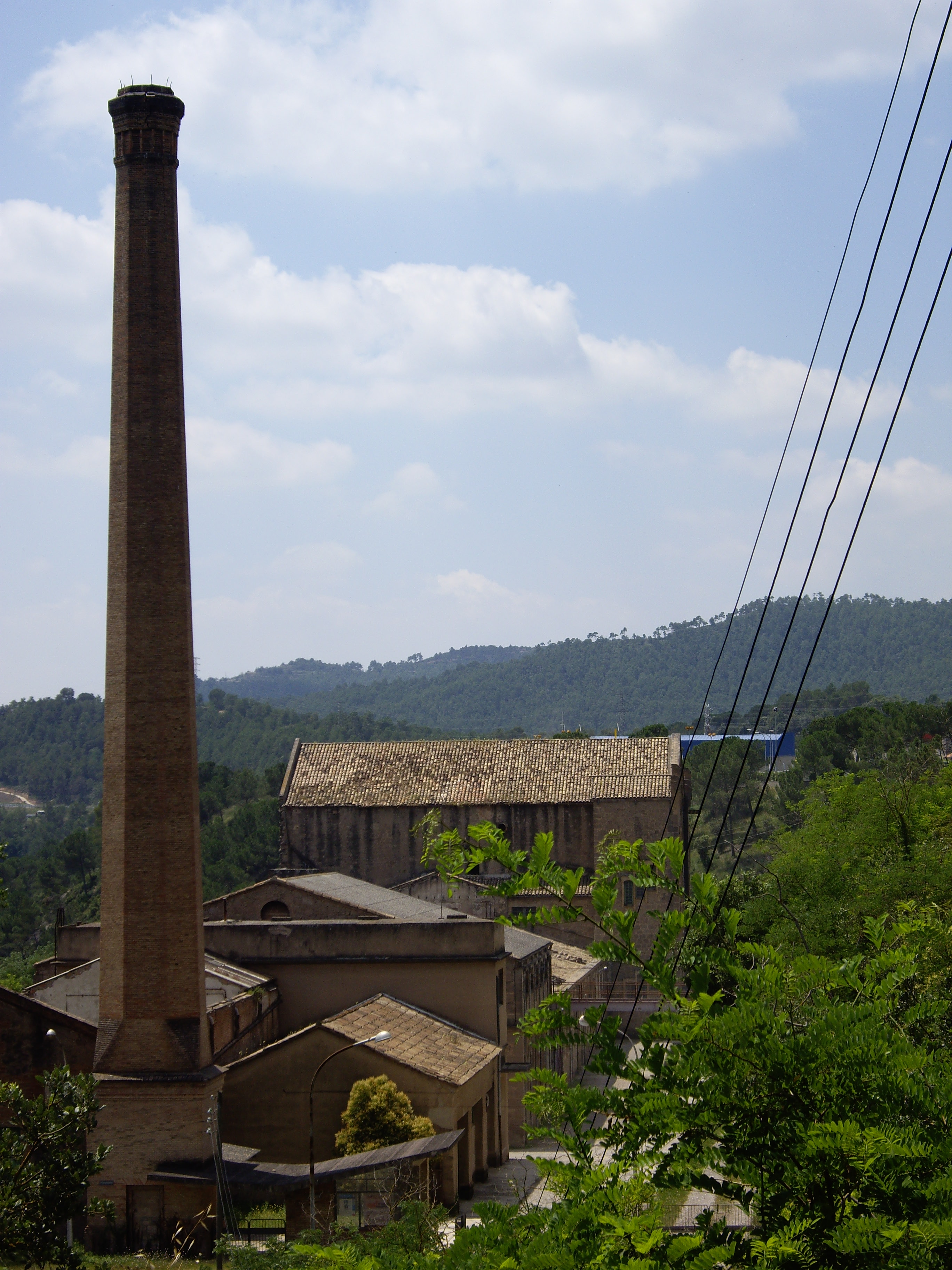 La Colònia Vidal, a Puig-reig (Catalunya), ha conservat tot el seu patrimoni industrial d'inicis de la Revolució Industrial. L'aigua del riu Llobregat es va aprofitar com a font d'energia. Les colònies constaven d'una escarola, en aquest cas pel filat i el teixit del cotó, i una zona residencial on vivien els obrers amb tots els serveis bàsics.